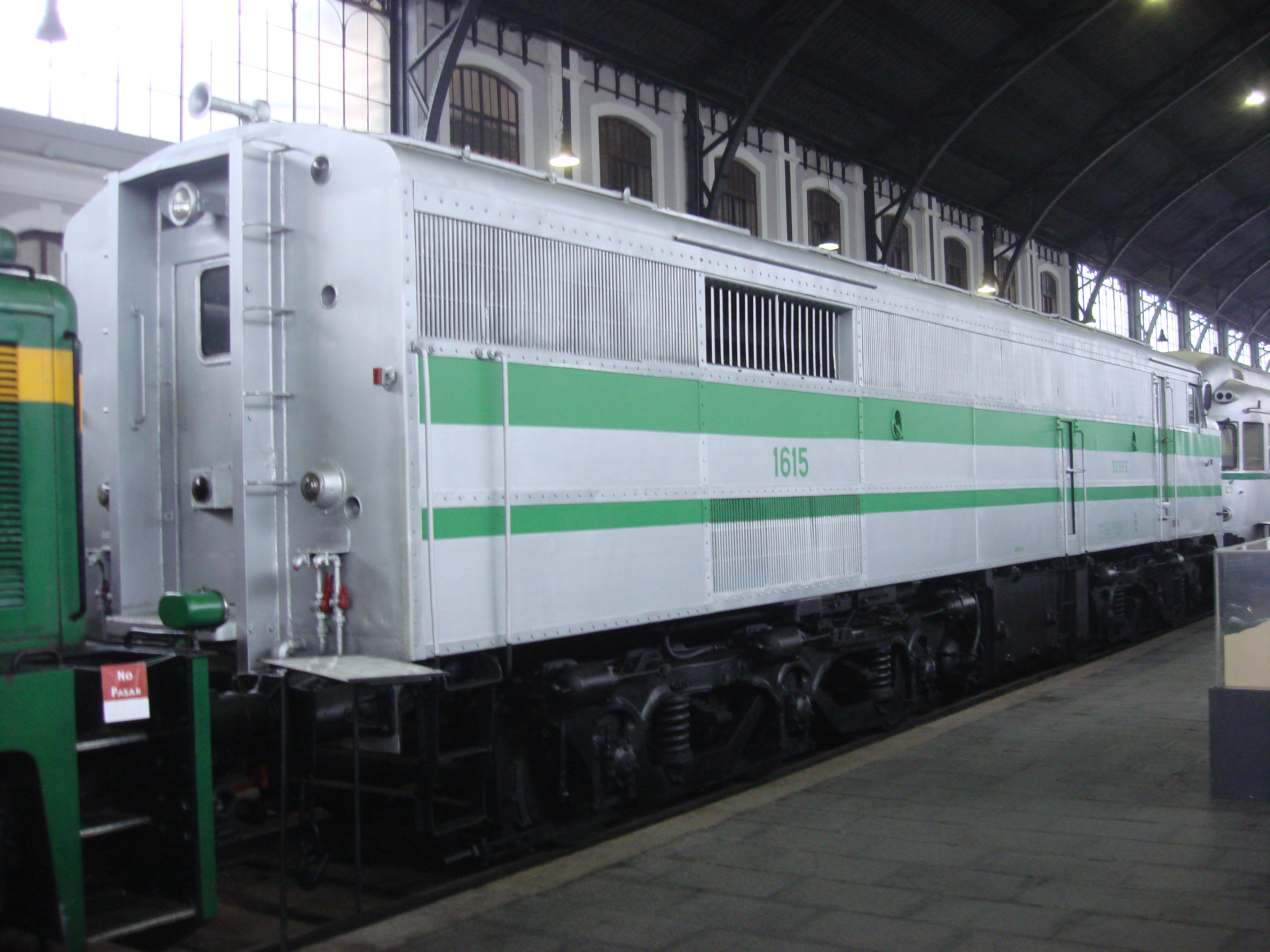 Own work